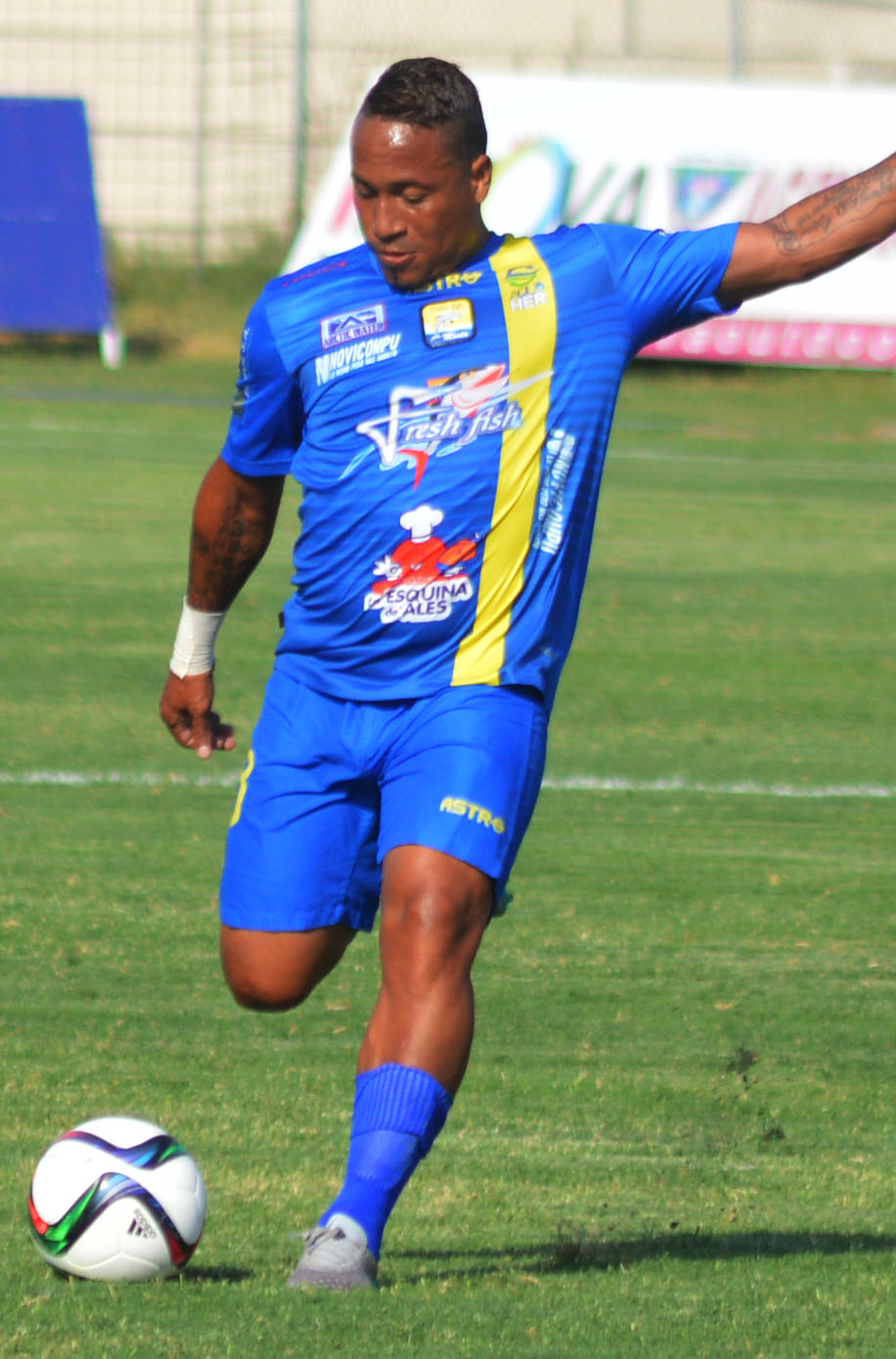 Freddy Olivo jugando para Delfín de Manta en 2015